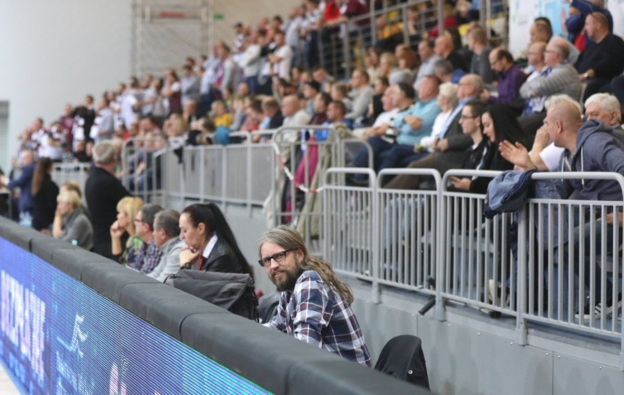 Redaktor Głosu Szczecińskiego Grzegorz Drążek w Koszalinie